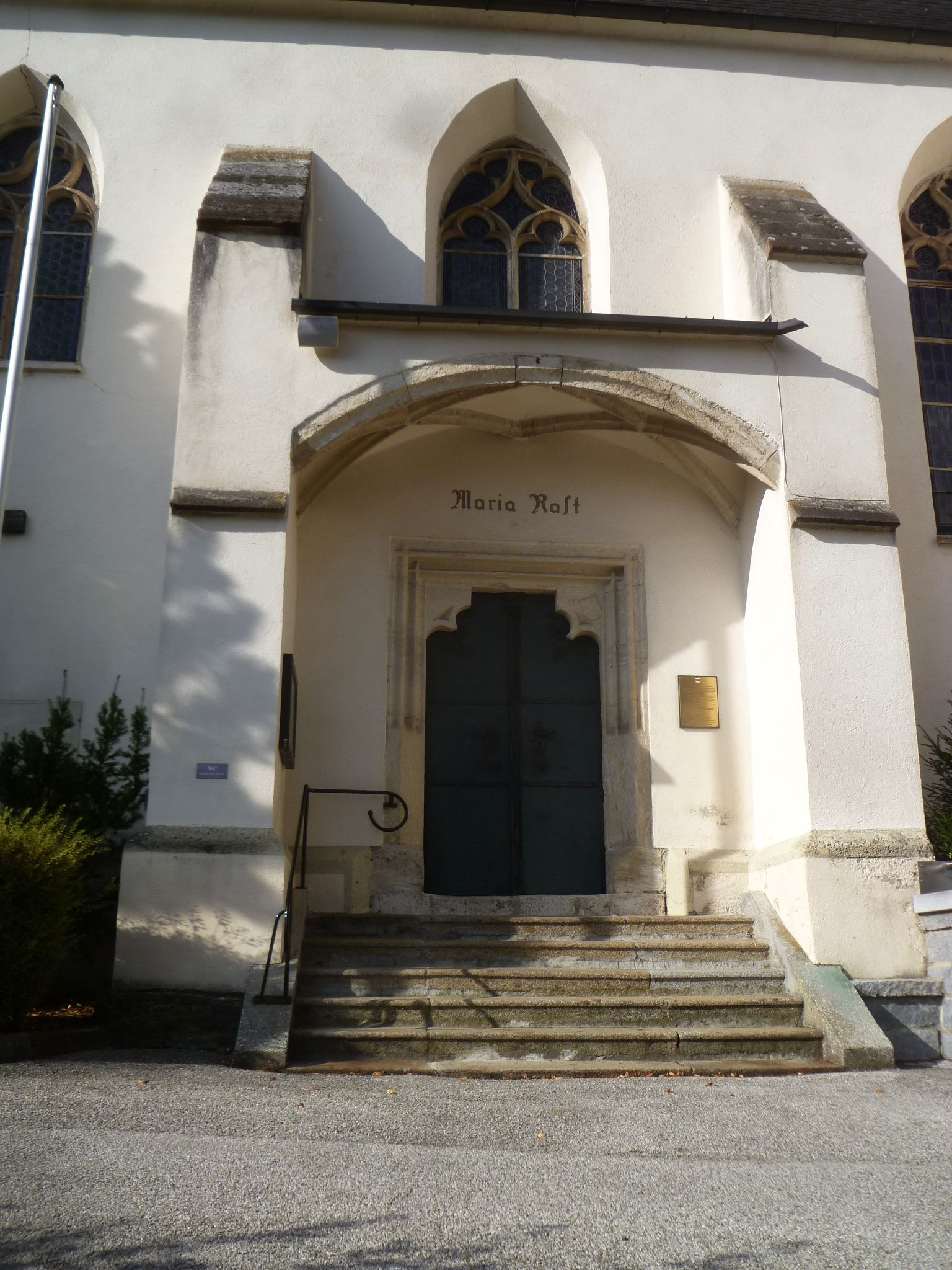 Kath. Pfarrkirche Mariae Heimsuchung